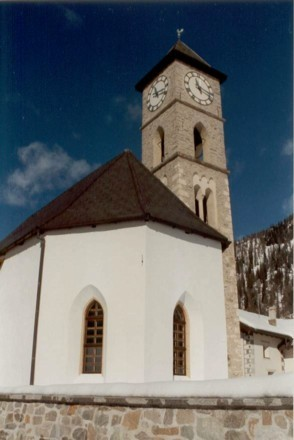 Evangelische Kirche von Tschierv im Münstertal, Kanton Graubünden, Schweiz. - Aufnahme: Jakob Vetsch, 20.02.1995.